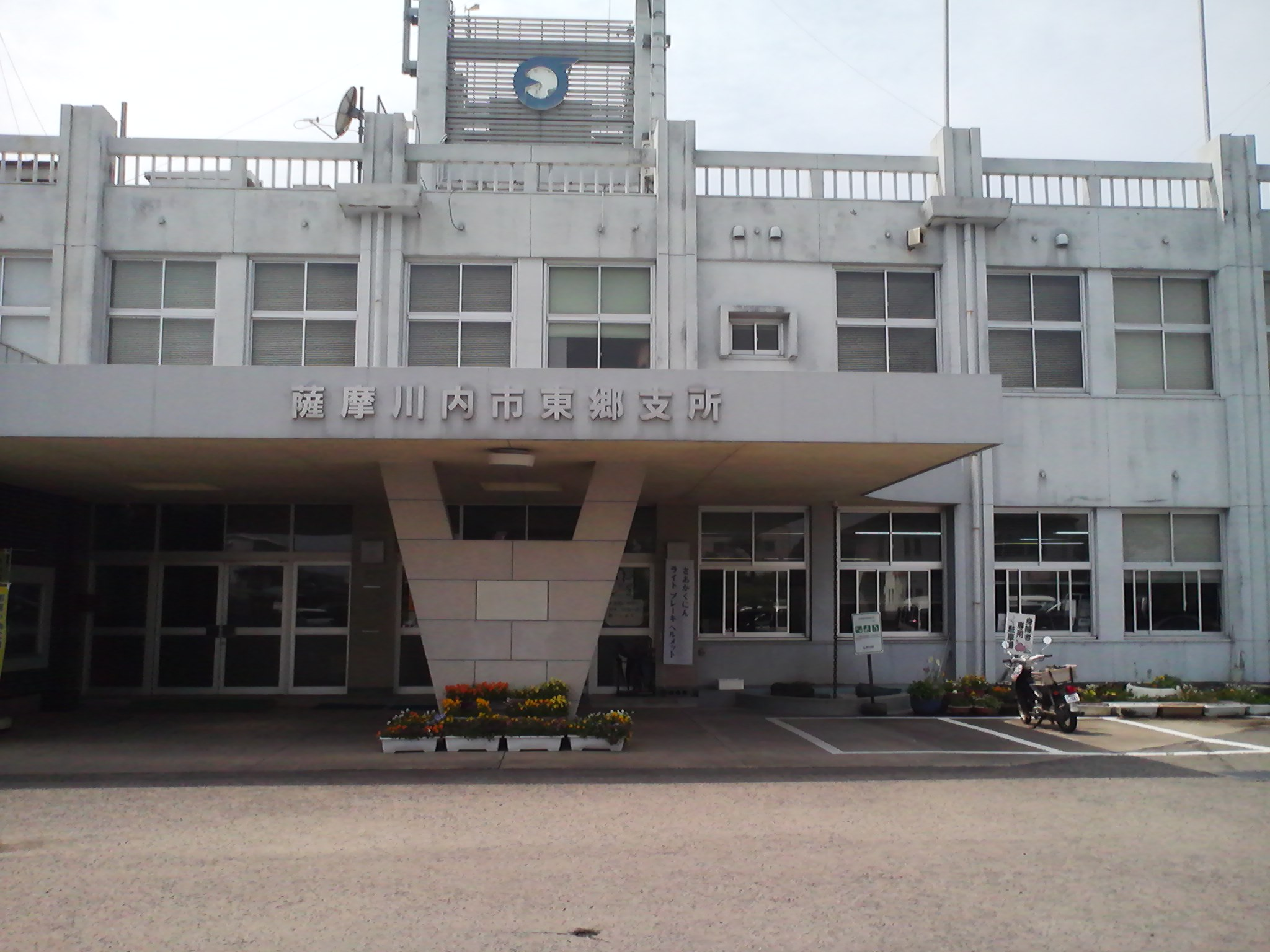 薩摩川内市役所東郷支所の庁舎の外観。